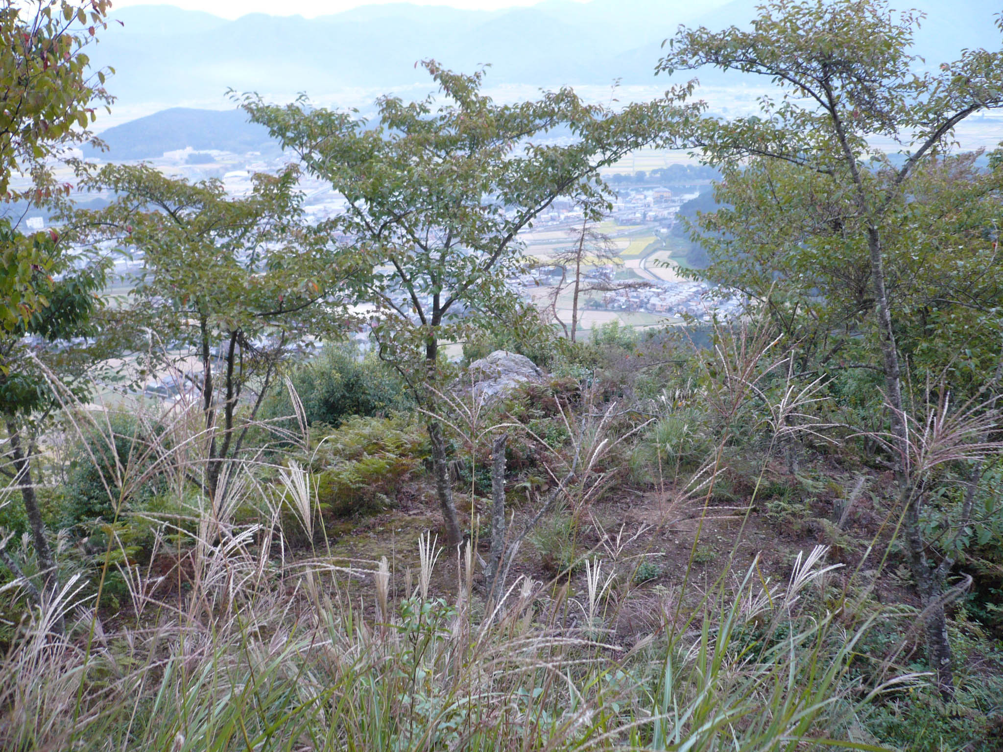 奥方屋敷曲輪